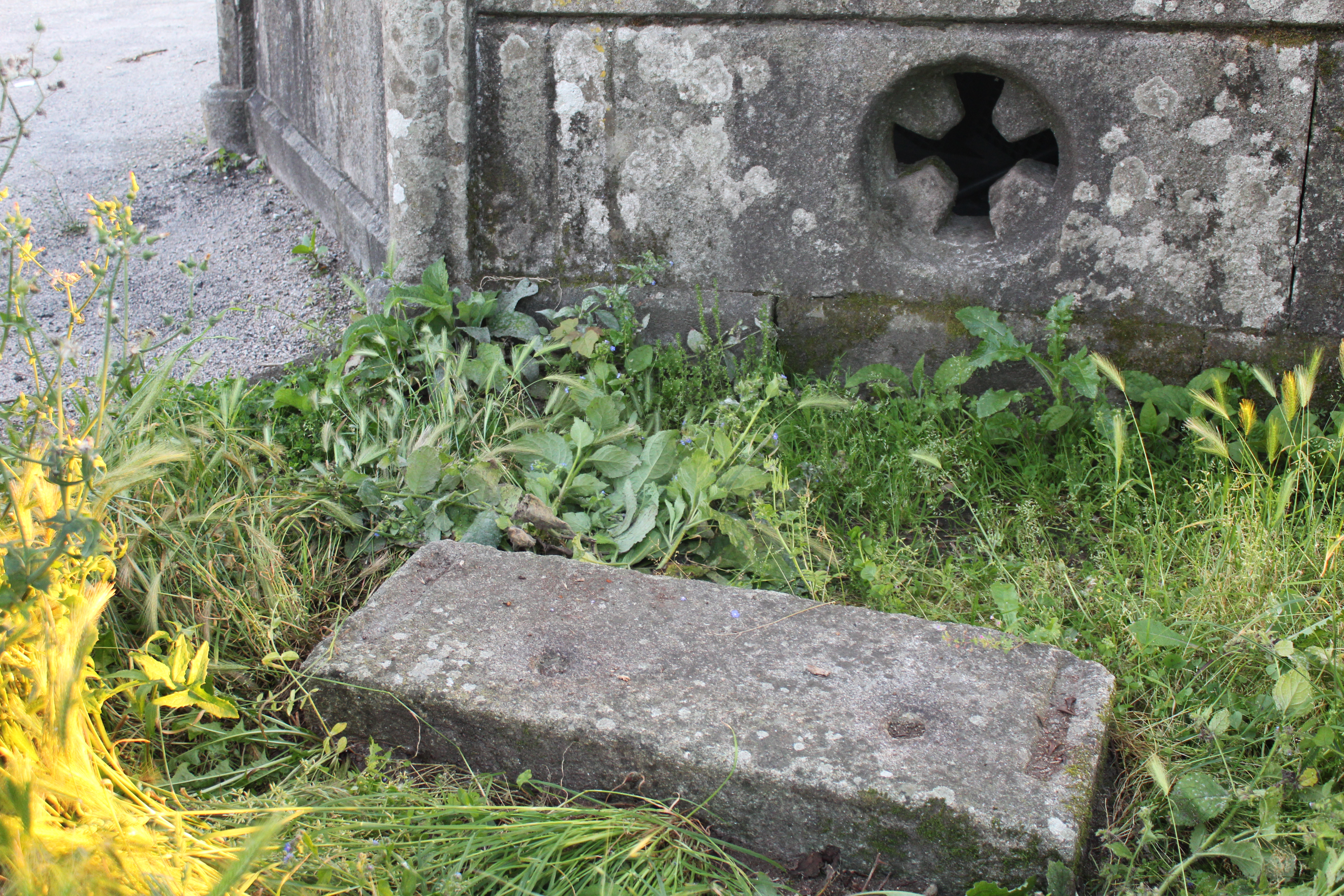 Pedra de birlos ou bolos celtas na igrexa de San Vicente de Mañufe, Gondomar, Galicia